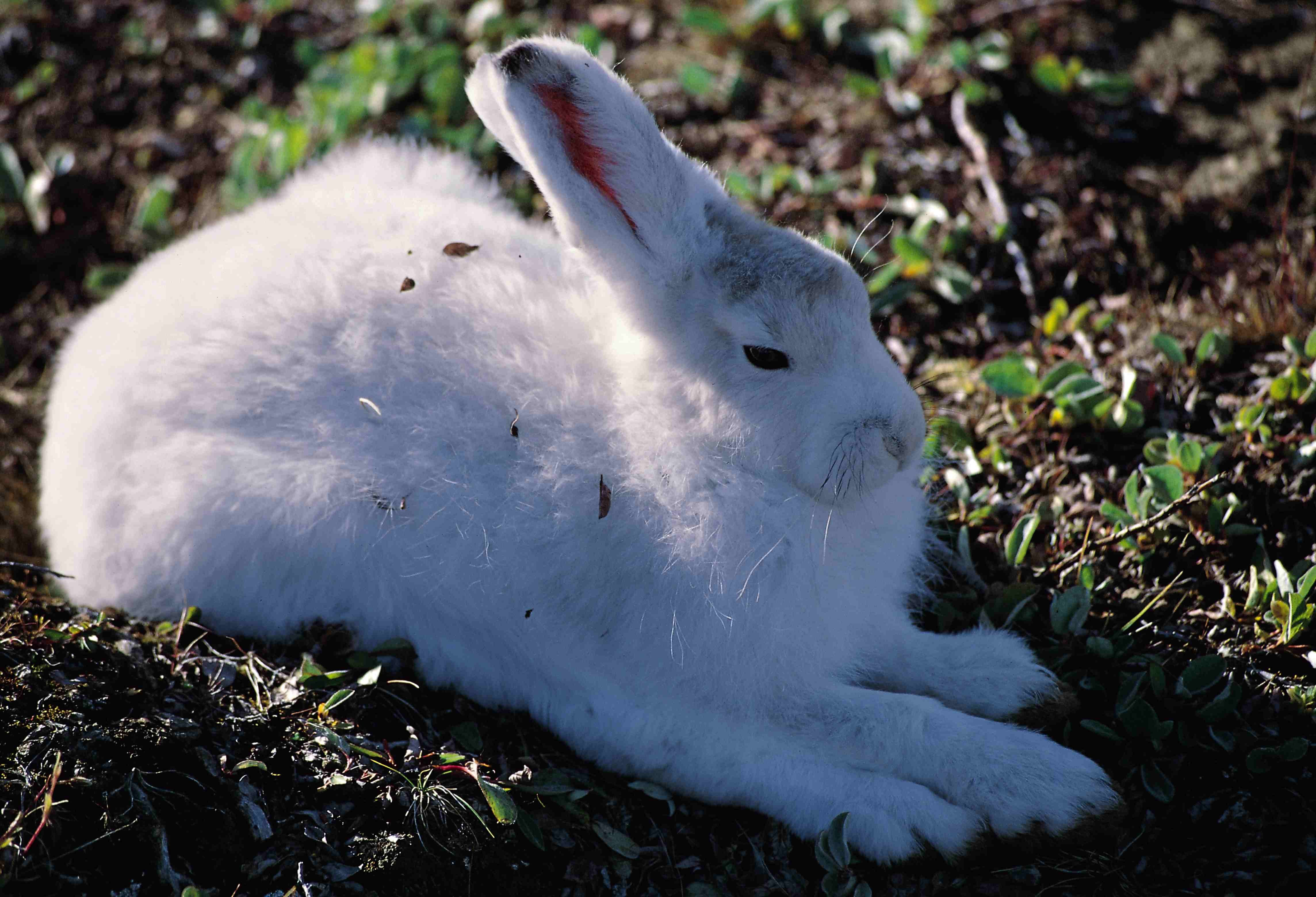 Arctic Hare (Ellesmere Island, Nunavut, Canada)